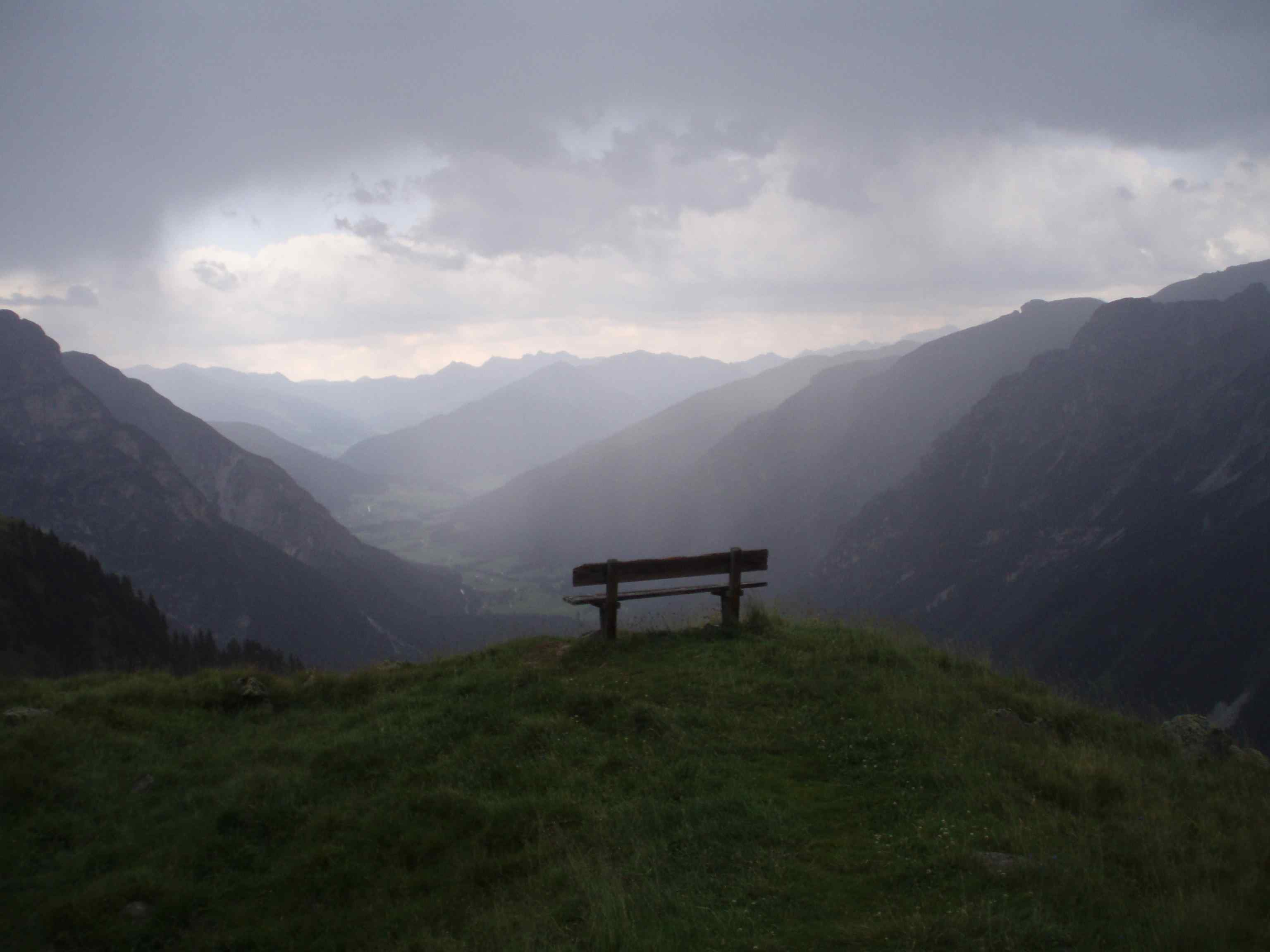 Heranziehendes Gewitter über dem Gschnitztal